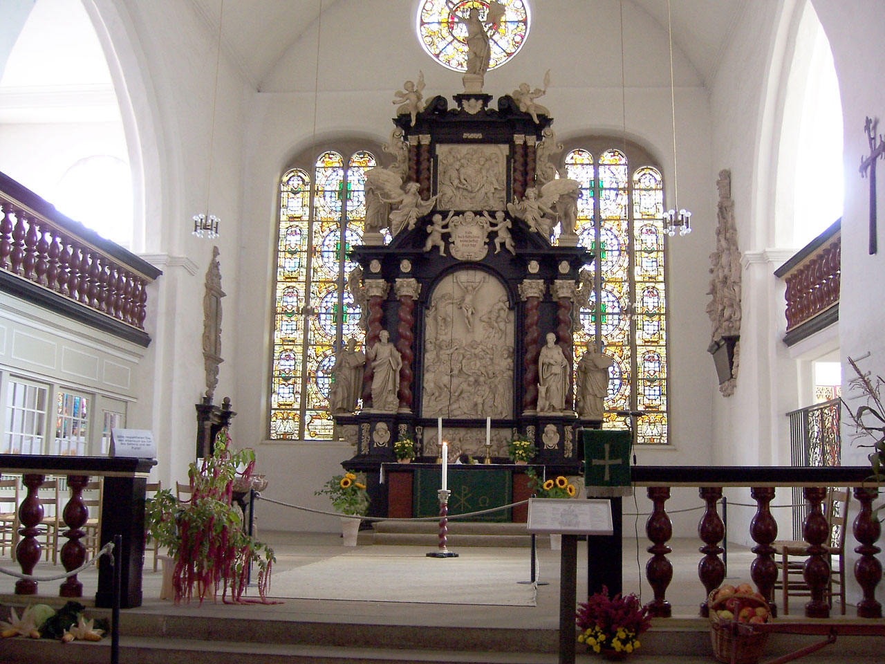 Stade, Kirche St. Cosmae (13.Jh), Hauptaltar von Christian Precht 1677